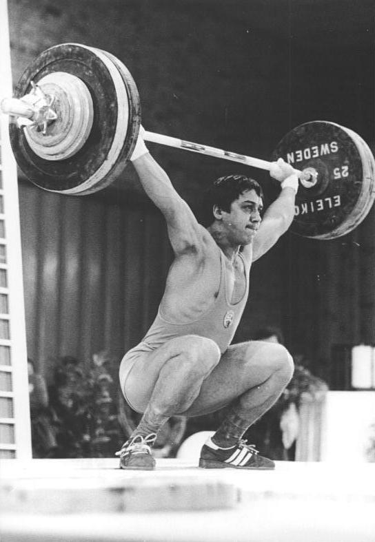 Joachim Kunz ADN-ZB Mittelstädt 20.12.1980 Bez. Frankfurt-O.: 32.DDR-Gewichthebermeisterschaft-Der Silbermedaillengewinner bei den Olympischen Spielen in Moskau Joachim Kunzvom SC Karl-Marx-Stadt gewann im Leichtgewicht mit 310,0 (140-170) . Zum erstenmal wurde der "DDR-Gewichtheber des Jahres" gekürt. Die Wahl der Journalisten fiel auf Joachim Kunz.